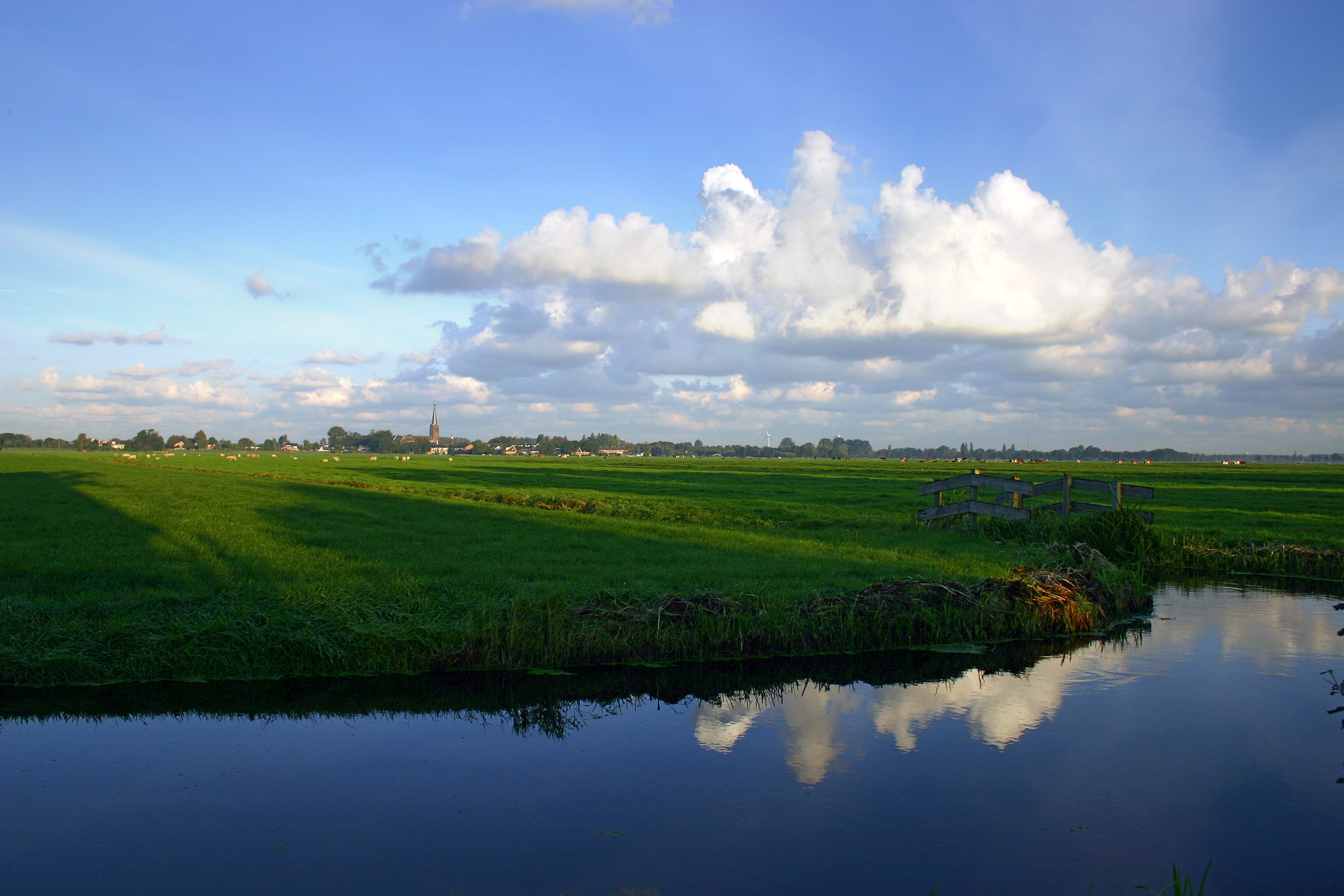 View of Zoeterwoude-Zuidbuurt from Zoeterwoude-Weipoort